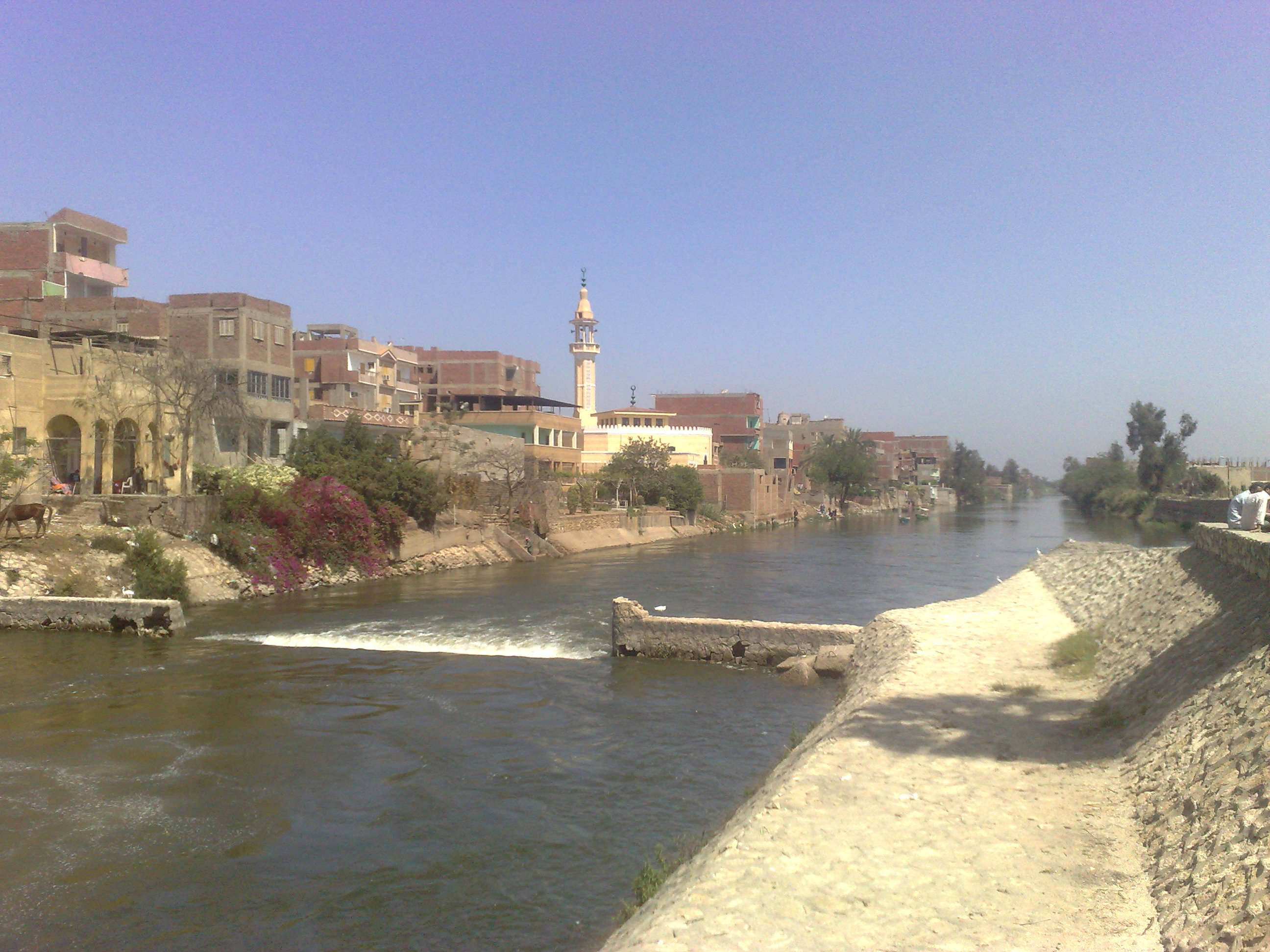 قرية كفر الغنامية، مركز الباجور